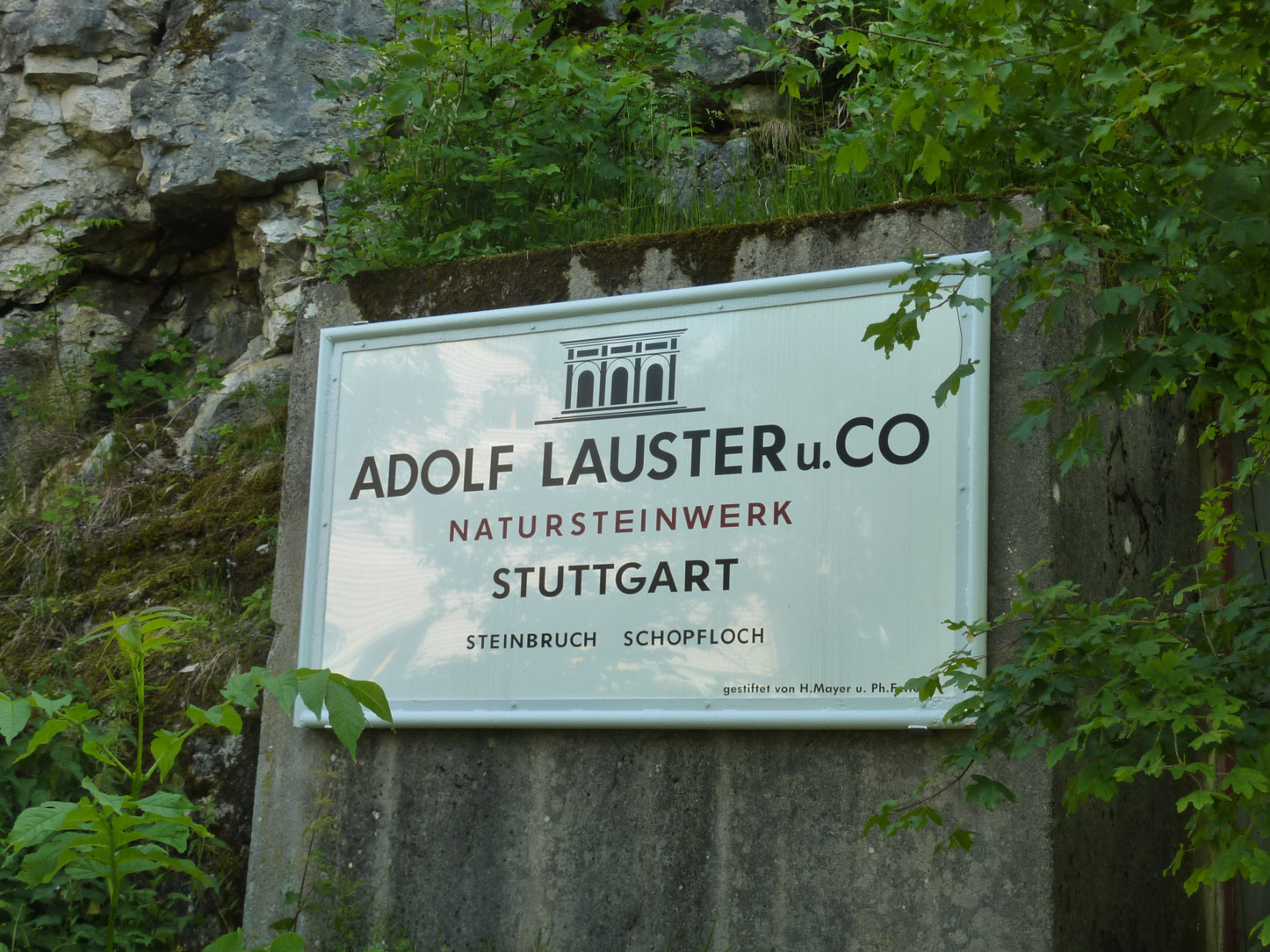 Schild des ehemaligen Steinbruchs Lauster in Schopfloch